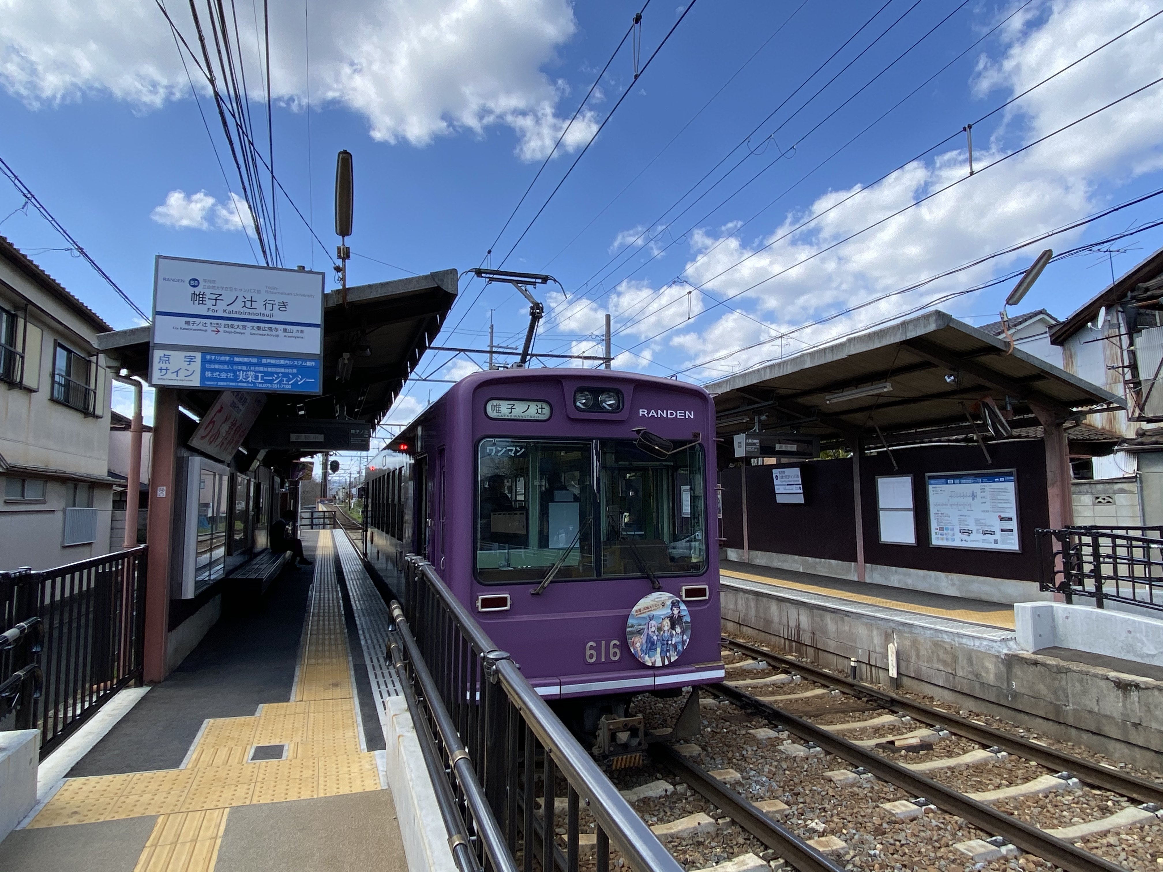 駅全景：駅名改称当日（2020年3月20日）撮影